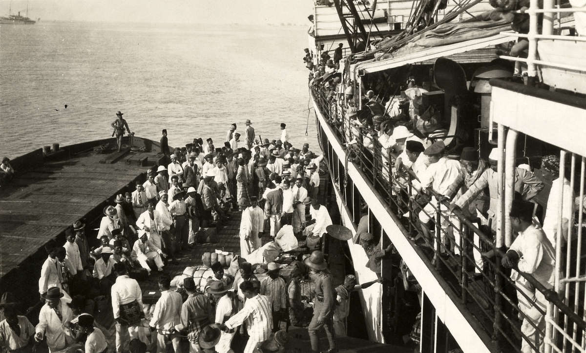 Communistische gevangenen. Geboeid worden een aantal communistische "raddraaiers" van boord gezet en geïnterneerd op Boven-Digoel. Indonesië, 1927